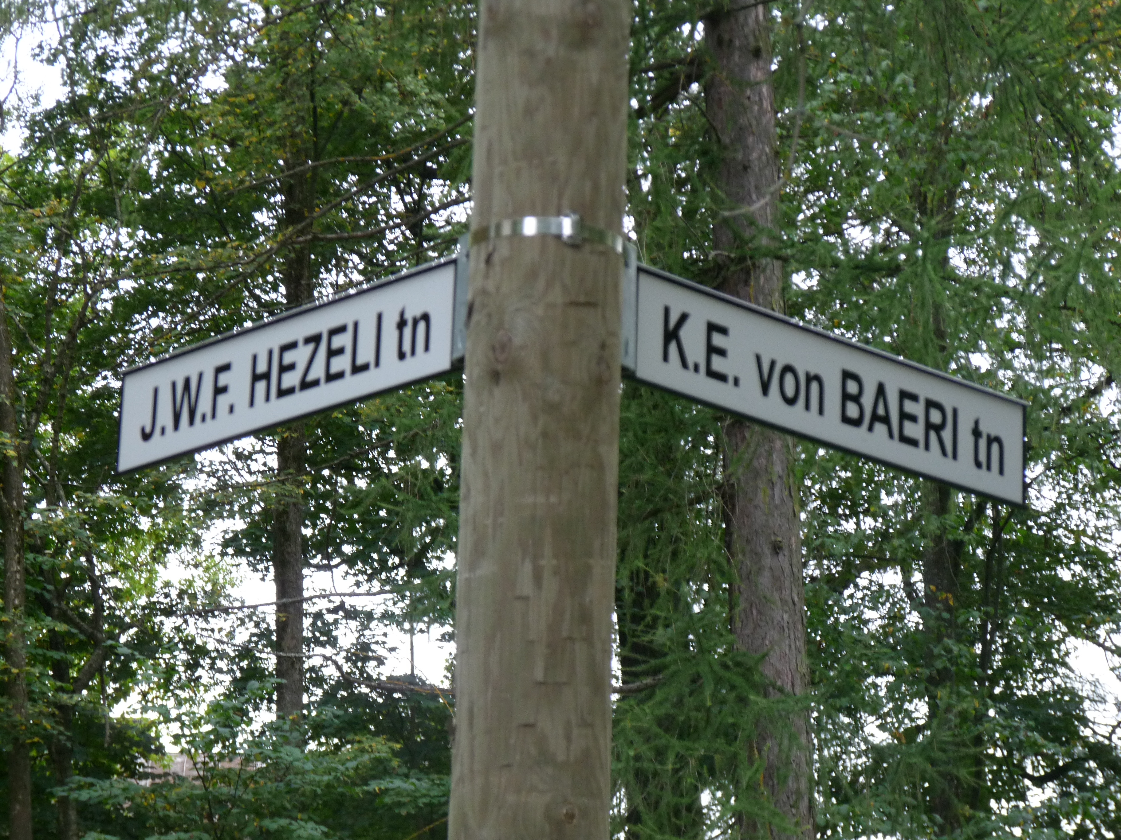 Tänavasilt Hezeli ja Baeri tänava nurgal Tartus, 22. september 2012